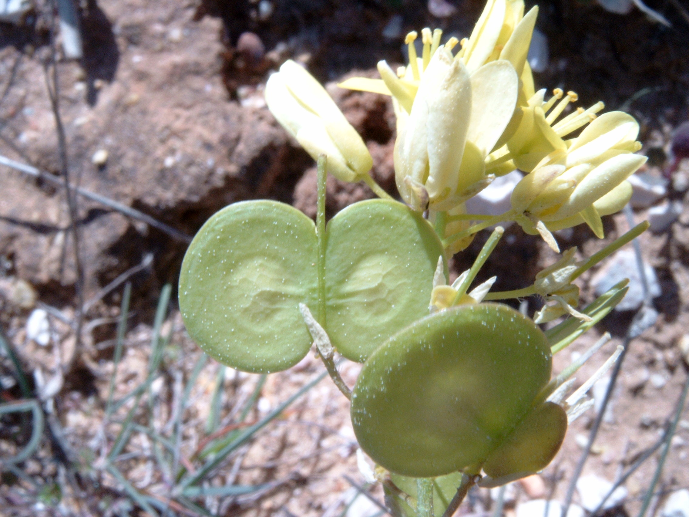 Name Biscutella vincentina Familiy Cruciferae